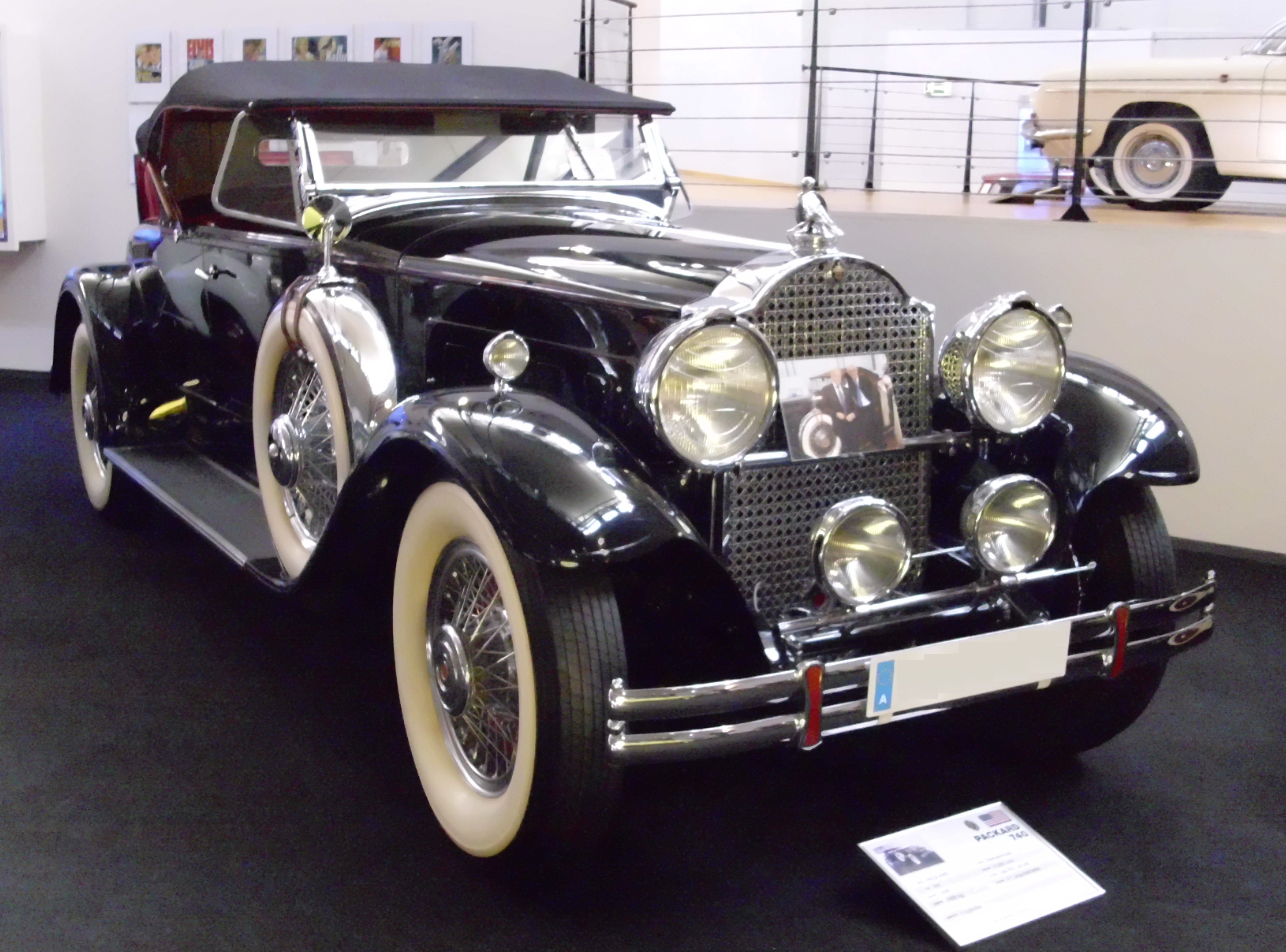 Packard 740 Custom Eight 1930 im Oldtimermuseum Koller Heldenberg